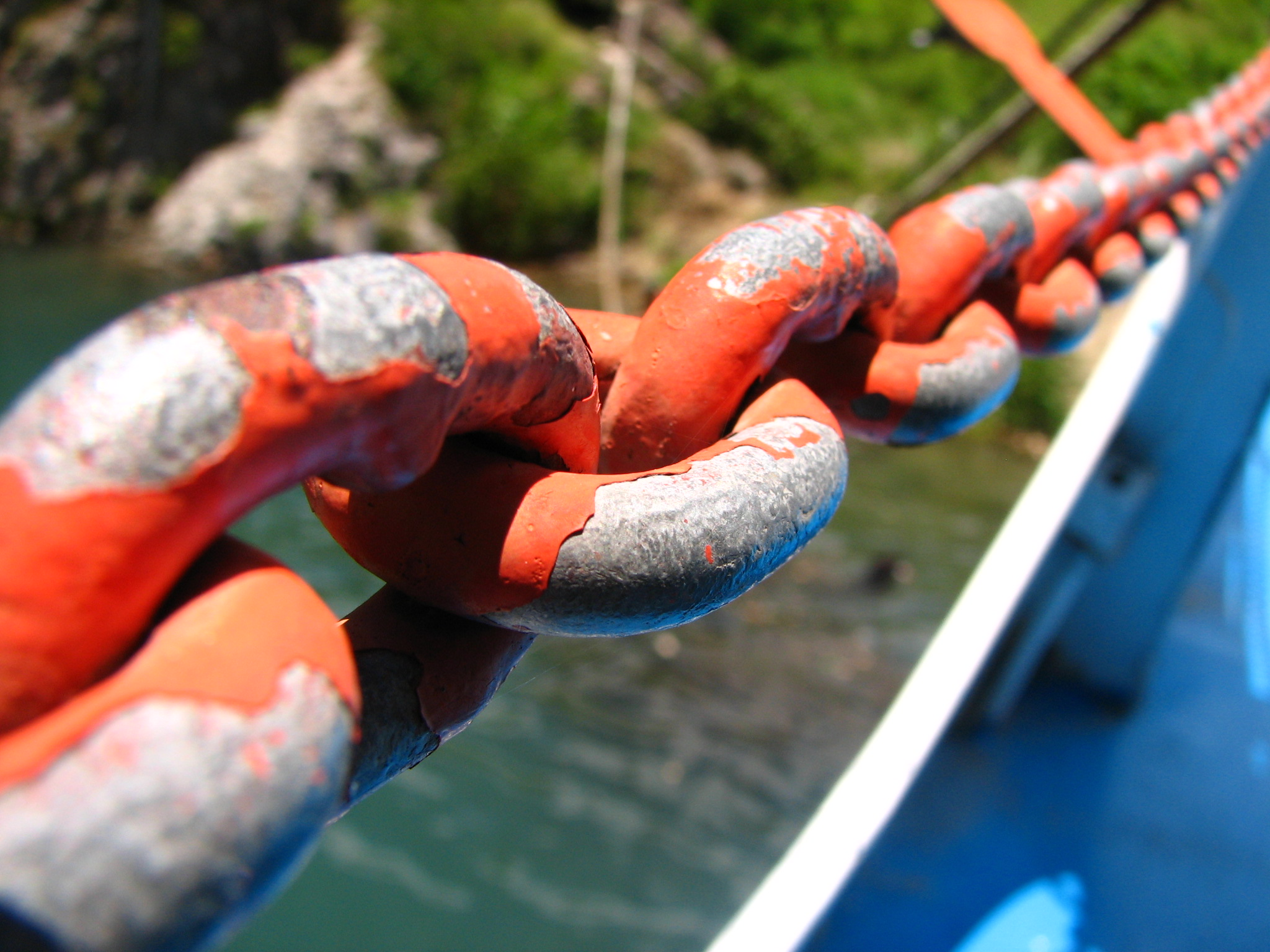 Cadena de barco una cadena roja en un barco